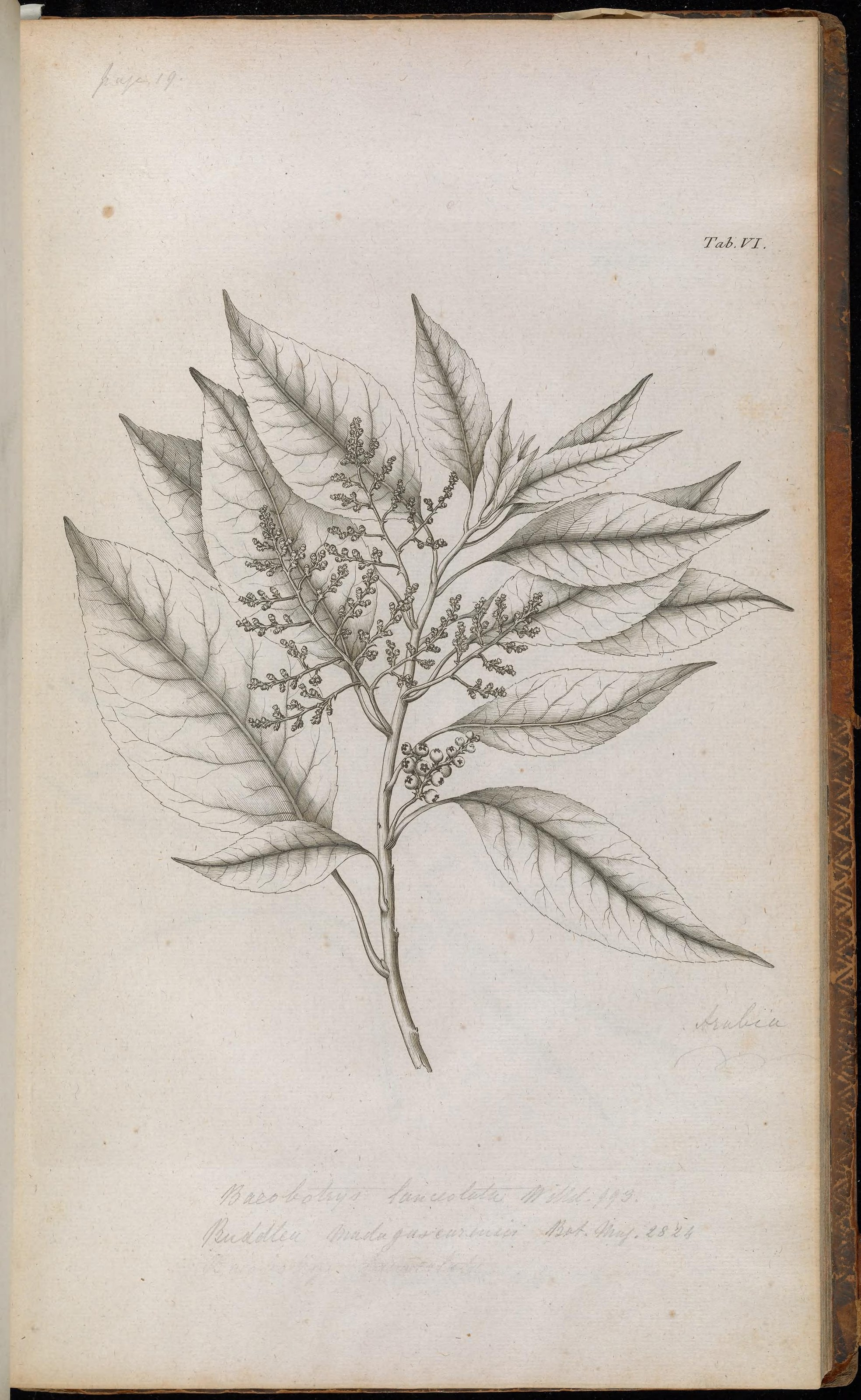 TaJ.\ n. \